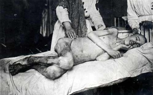 Хлопець тяжко хворий від голоду (повіт Гуляй Поле).